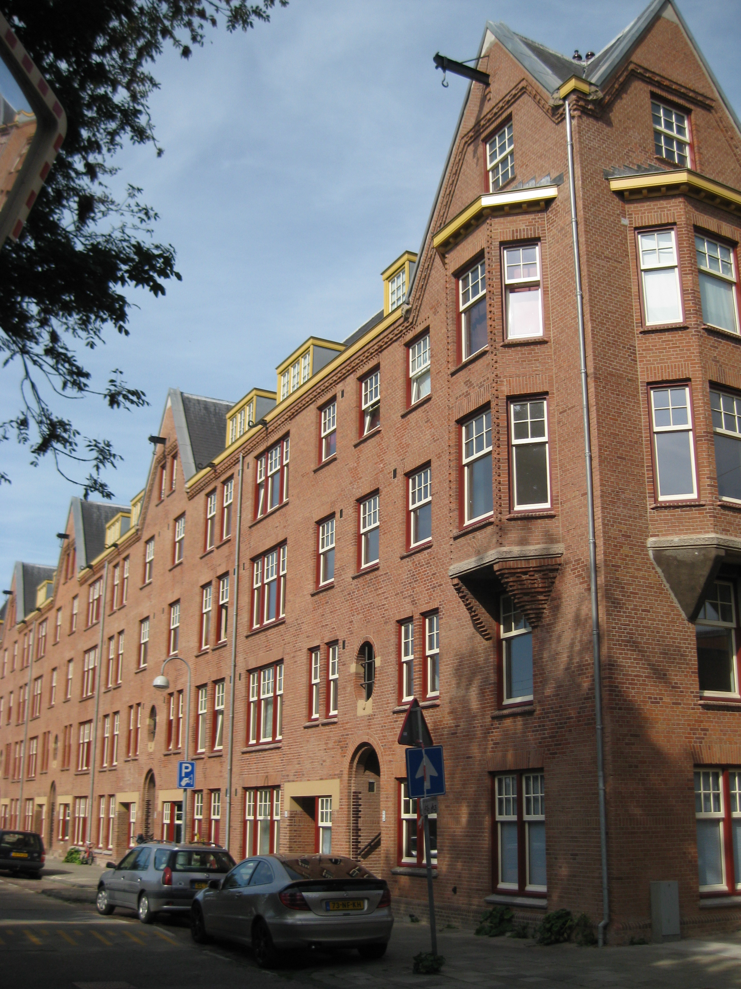 Zaanstraat 250, Amsterdam-West, Spaarndammerbuurt, Zaanhof. Sociale woningbouw van woningbouwvereniging Patrimonium. Architecten Tj. Kuipers en A.U. Ingwersen, ontworpen in 1915-1916, voltooid 1919.